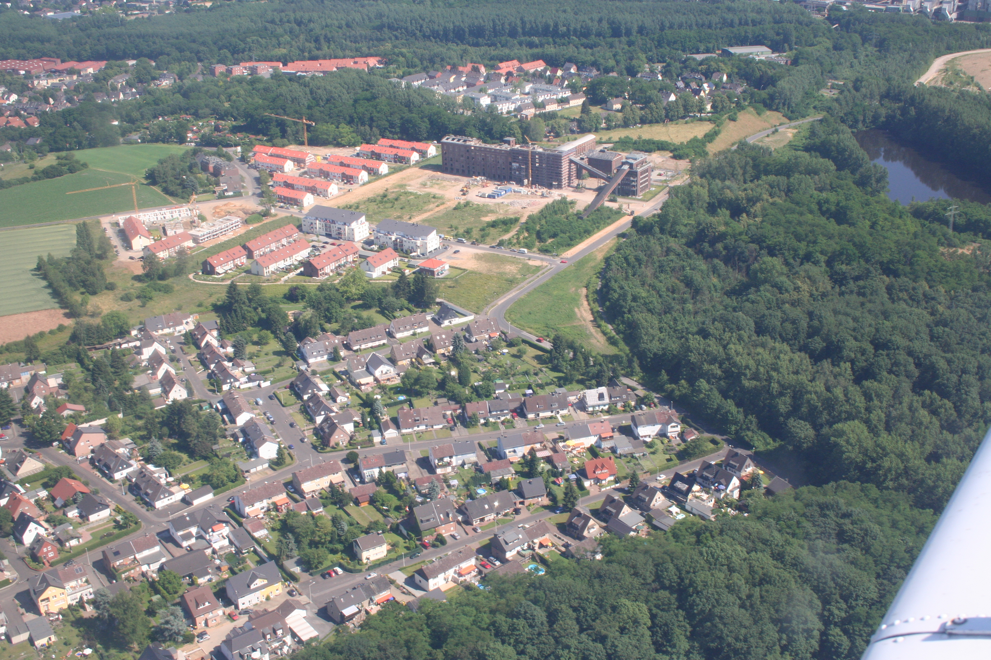 Flug über die Siedlung Grube Carl in Frechen